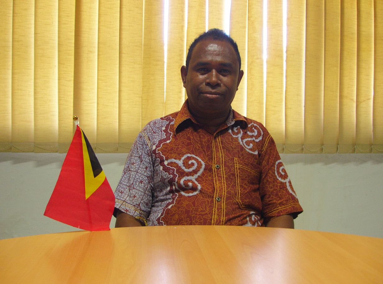 António dos Ramos, Administrator des Subdistrikts Baguia